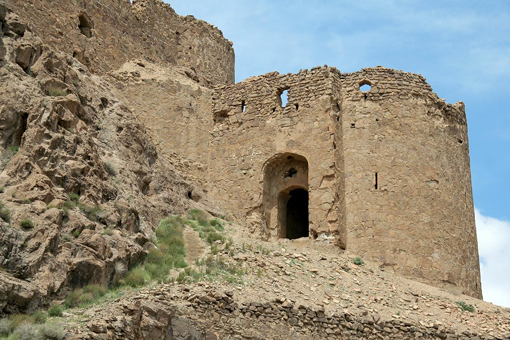 قلعه سارو (جنوبی)